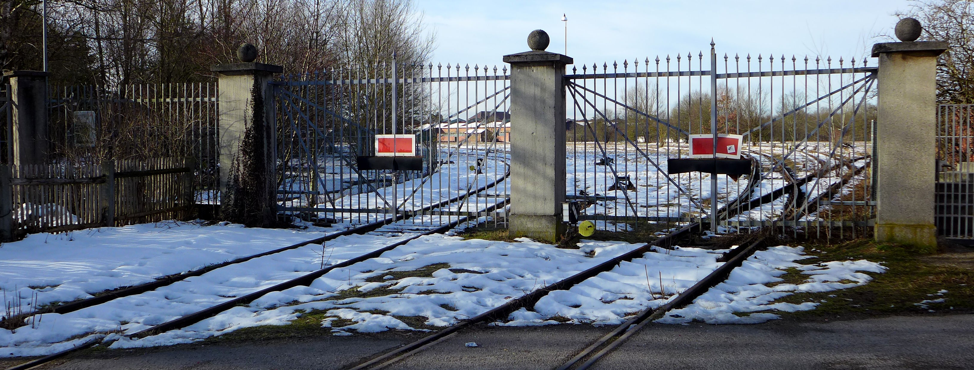 Papinstr. 53 Zufahrtstor, München